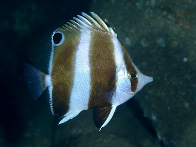 ゲンロクダイの一種1 Roa sp.